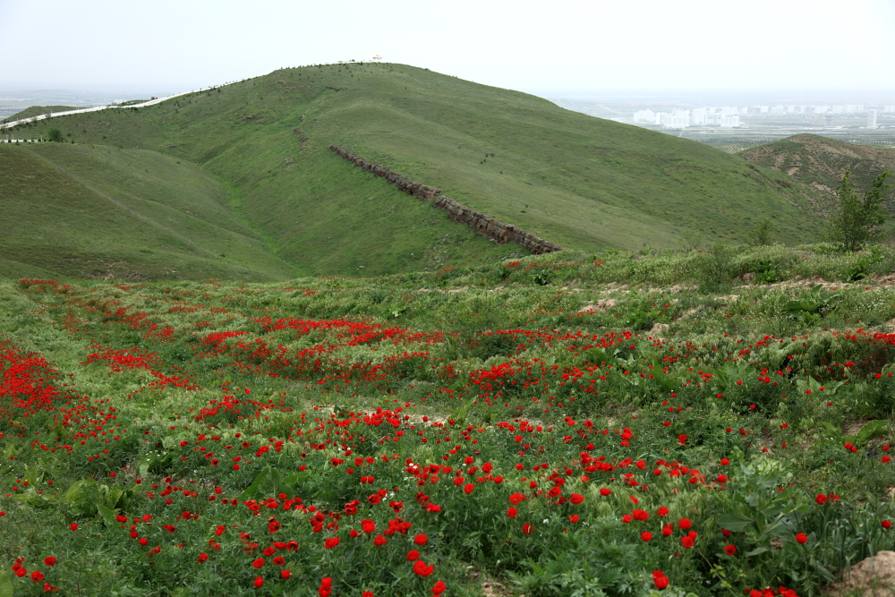 Ashgabat